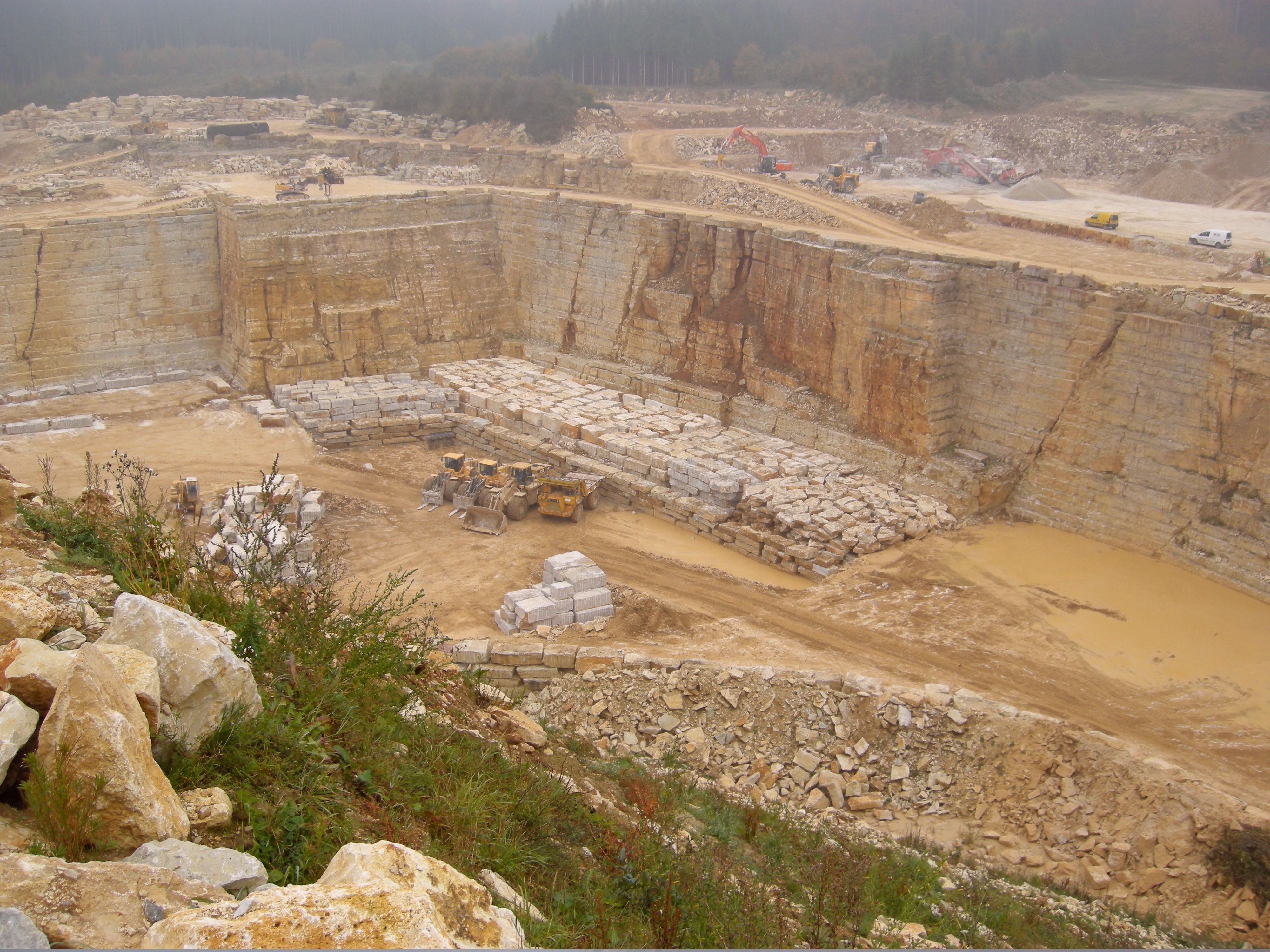 Фотография карьера по добыче юрского известняка III-Rothestein, Firma J.Stiegler KG